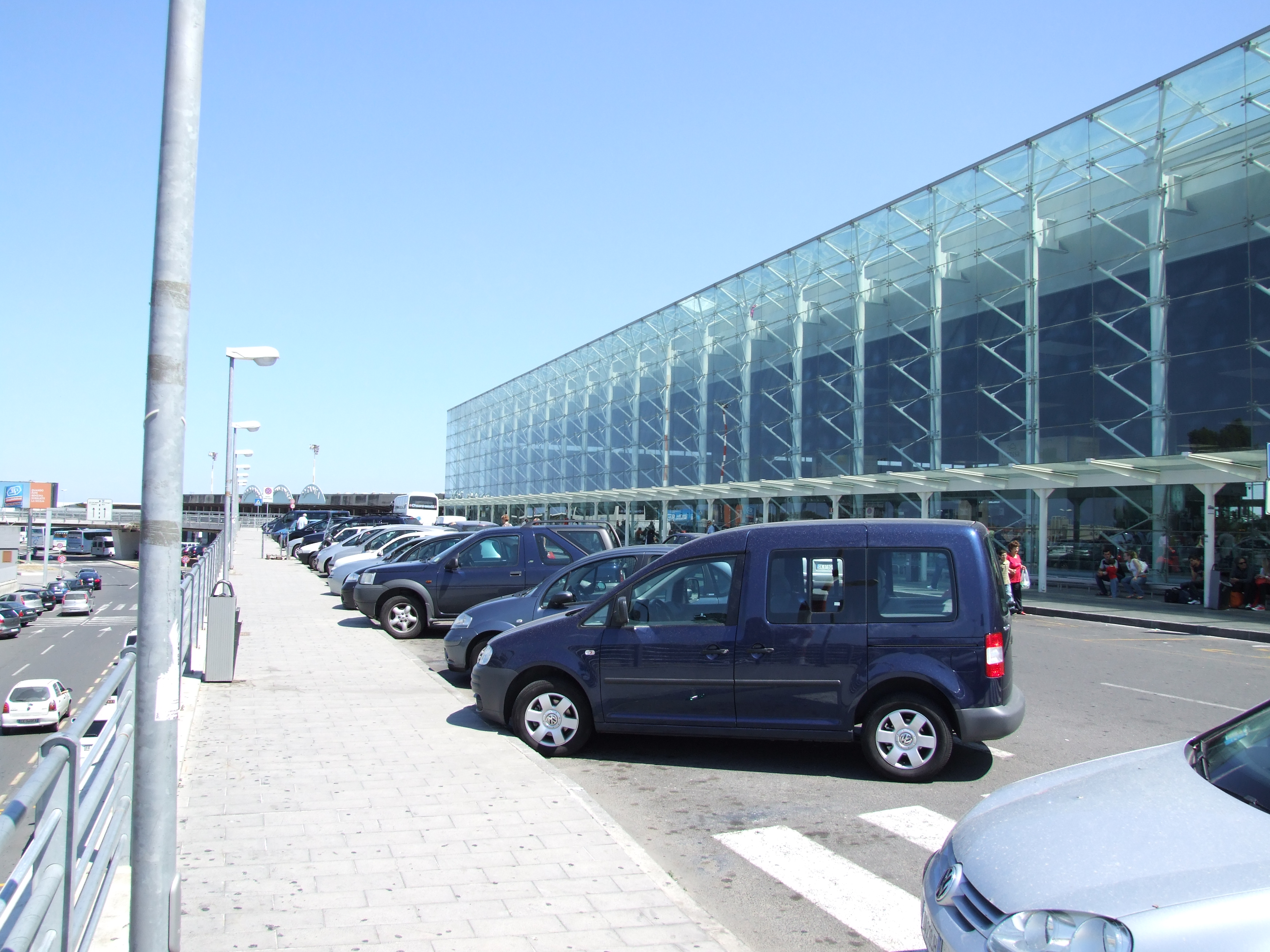 Fontanarossa-Catania-Sicilia-Italy-Castielli_CC0_HQ